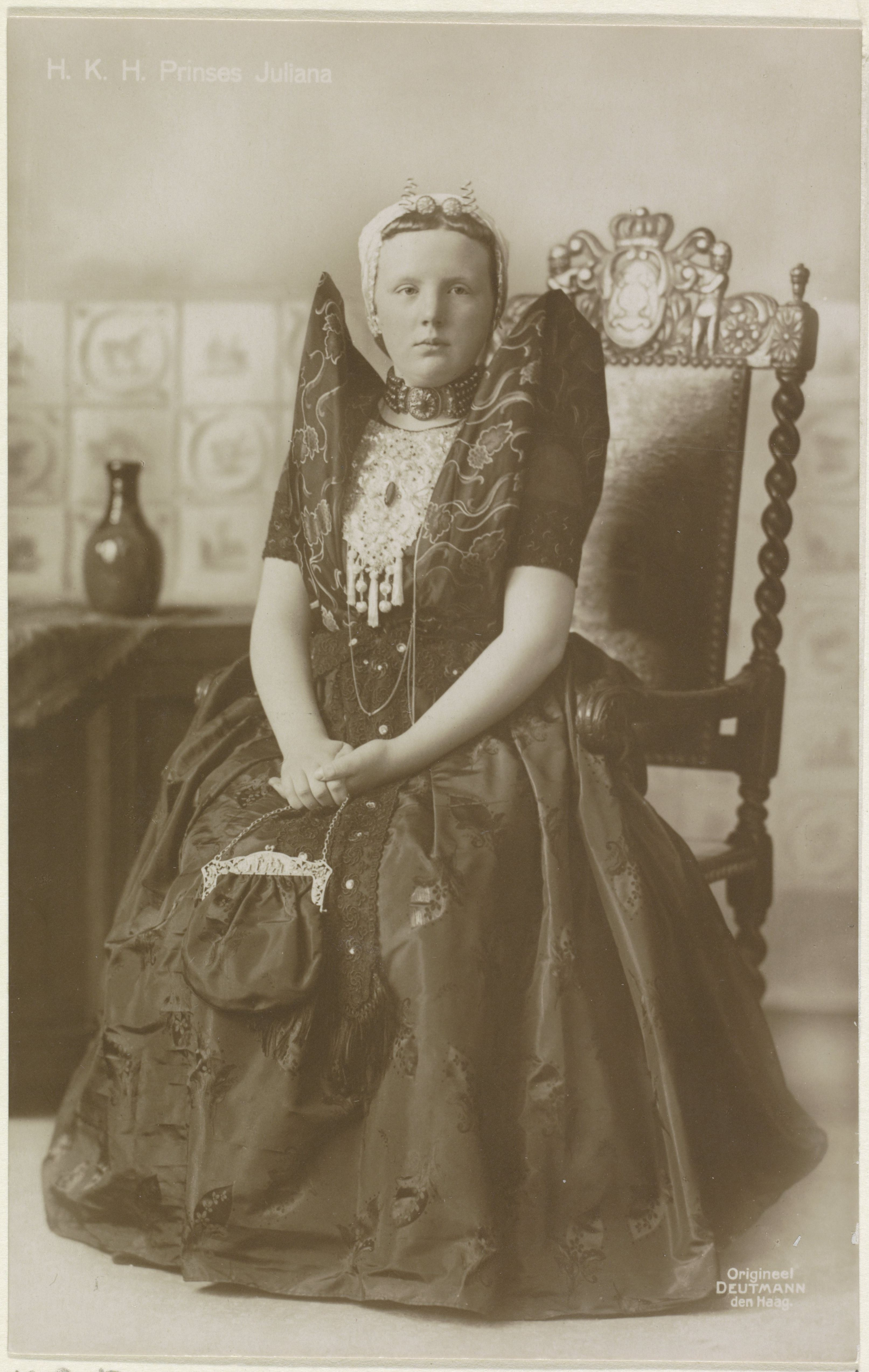 Prinses Juliana in Axels kostuum. In 1922 kwam een delegatie uit Zeeuws-Vlaanderen naar het Haagse Paleis Noordeinde om Prinses Juliana een Axels kostuum aan te bieden.